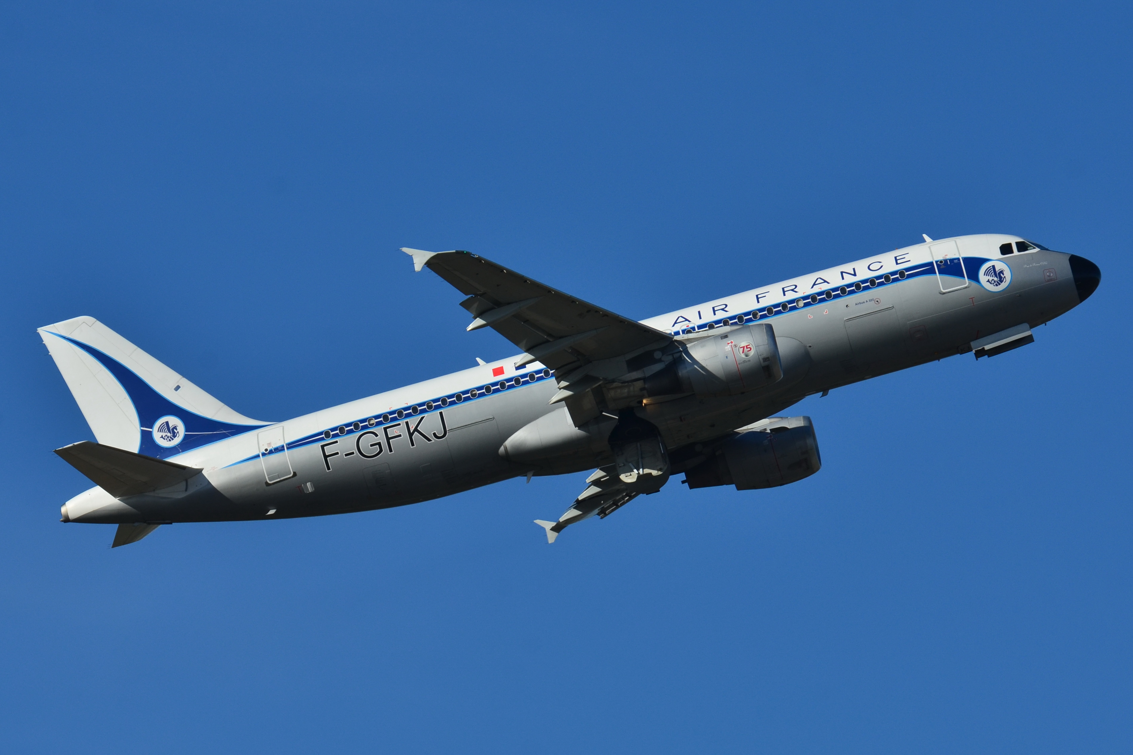 Photo prise à l'aéroport de Toulouse-Blagnac (LFBO) en France. Picture take at Toulouse-Blagnac Airport (LFBO) in France.